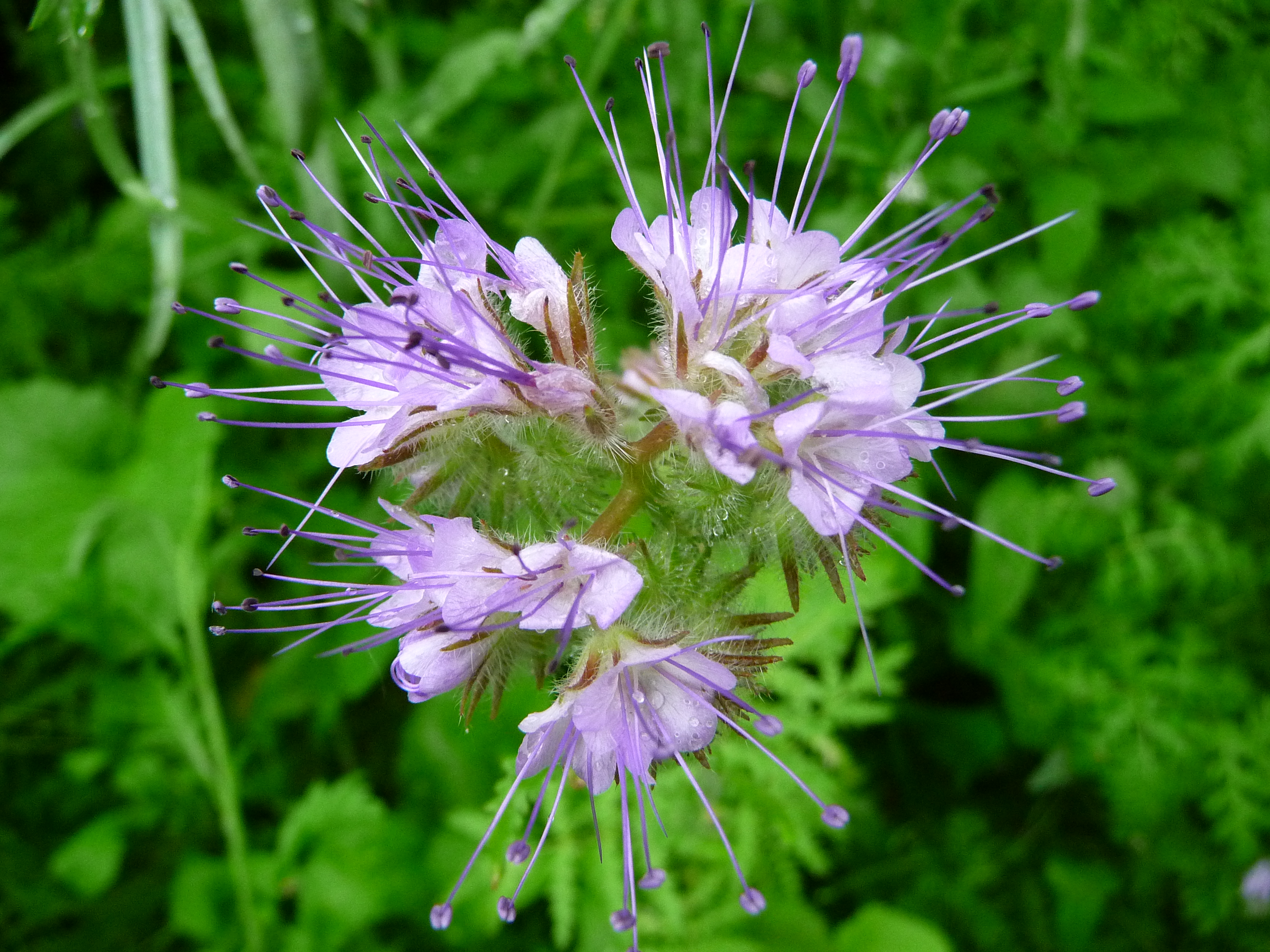 Blüte einer Rainfarn-Phazelie (Phacelia tanacetifolia)(fotografiert in Nordbaden Ende Mai); ein herzliches Danke an die Redaktion Biologie der de.WP für die Hilfe